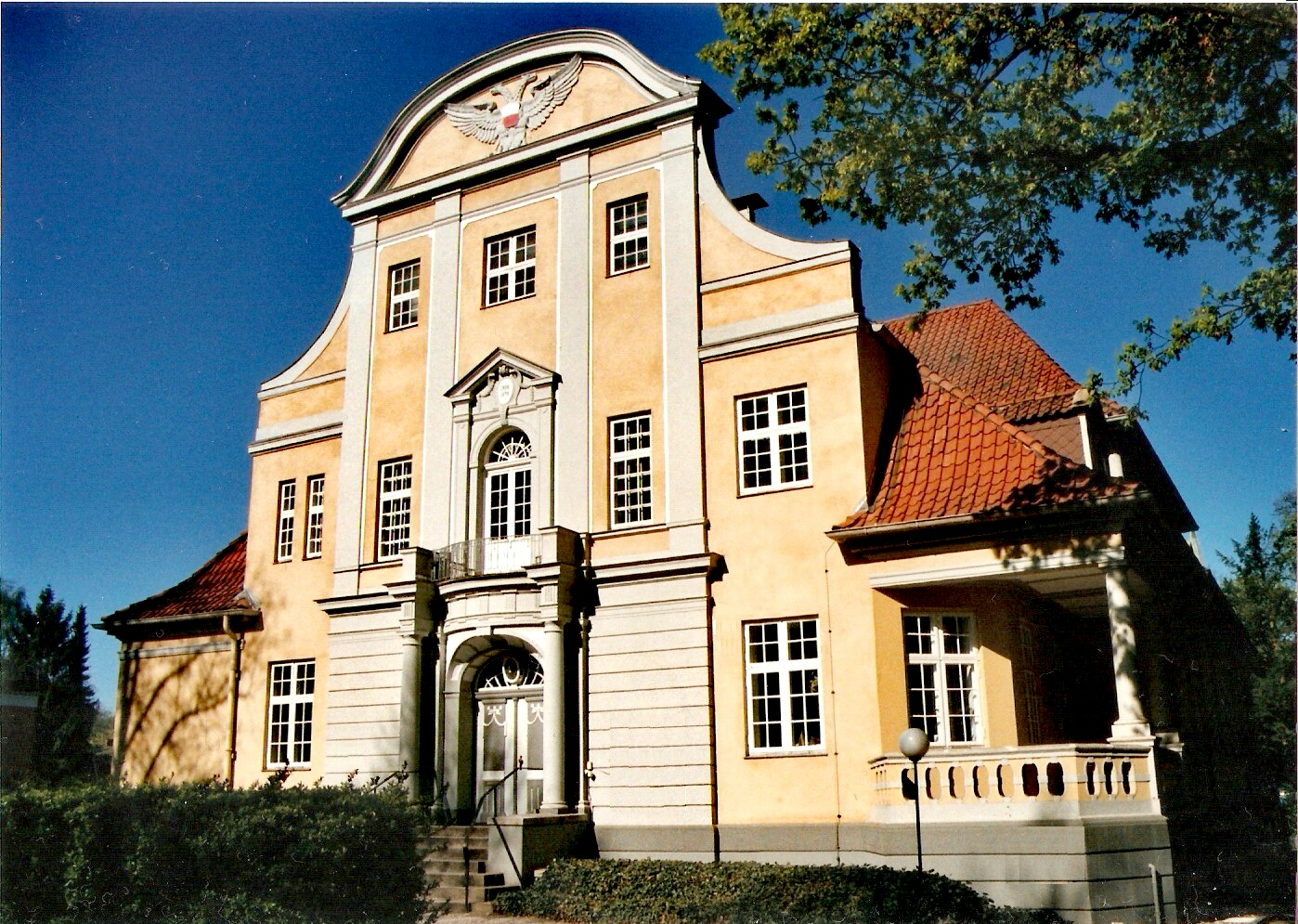 Kasino